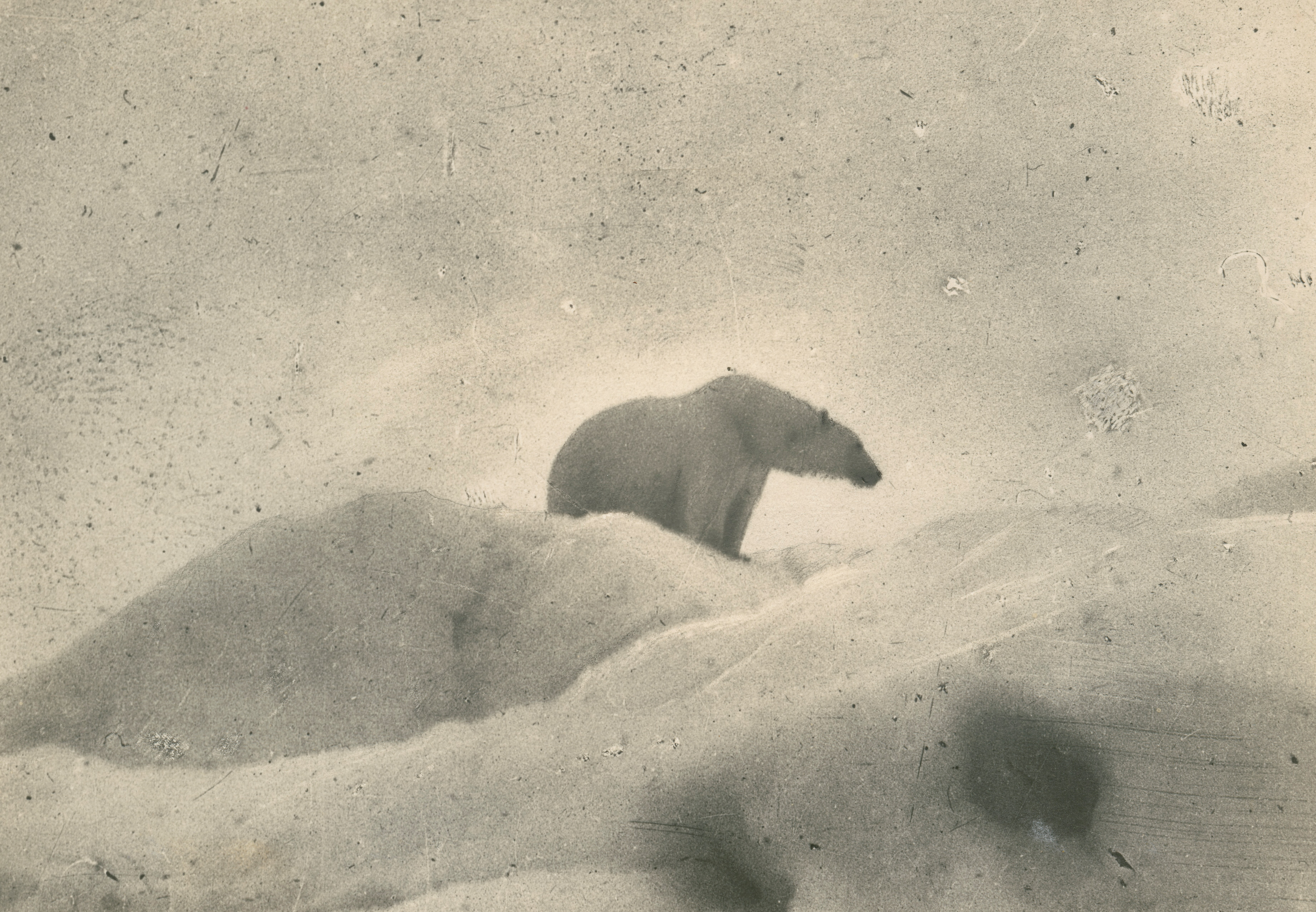 Isbjørn på ismassene. Ett av bildene fra ekspedisjonen med polarskip mot Nordpolen i perioden 24 juni 1893 til 13 august 1896. Etter planen skulle skipet drive i isen med havstrømmer fra Sibirkysten over Nordpolen mot Grønland. I mars 1895 foretok Fridtjof Nansen sammen med en ledsager en hasardiøs skiferd med hundesleder i forsøket på å komme til polpunktet. Depicted place: Russland, Frans Josefs Land, Kap Flora